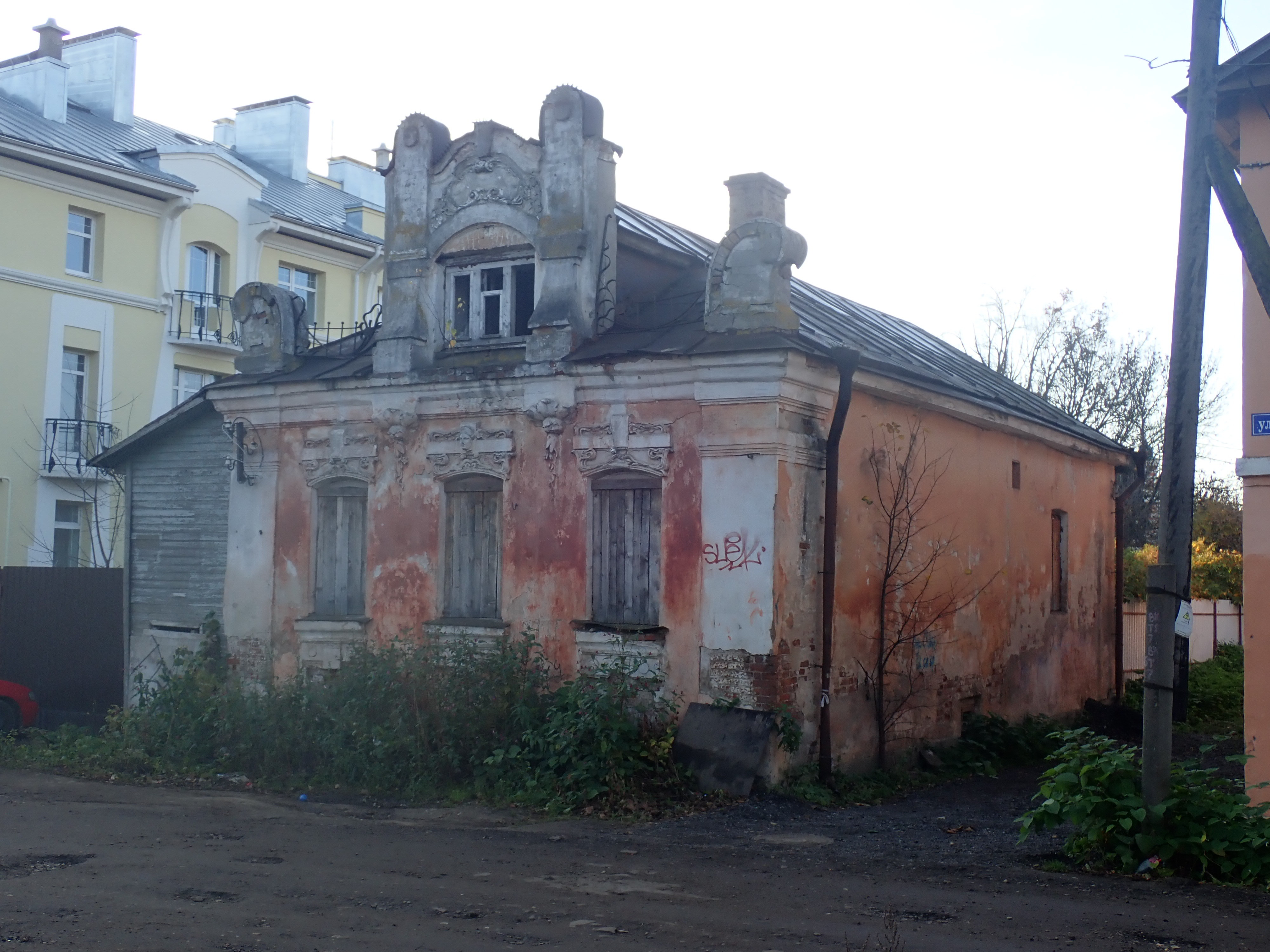 Состояние памятника на осень 2019 года